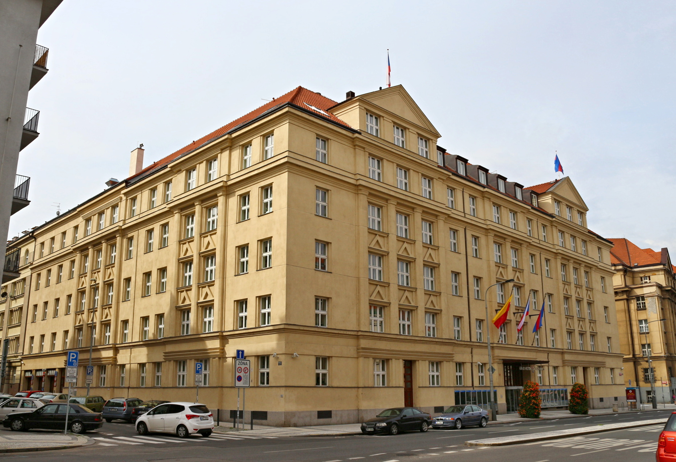 Dejvice budova ÚMČ Praha 6